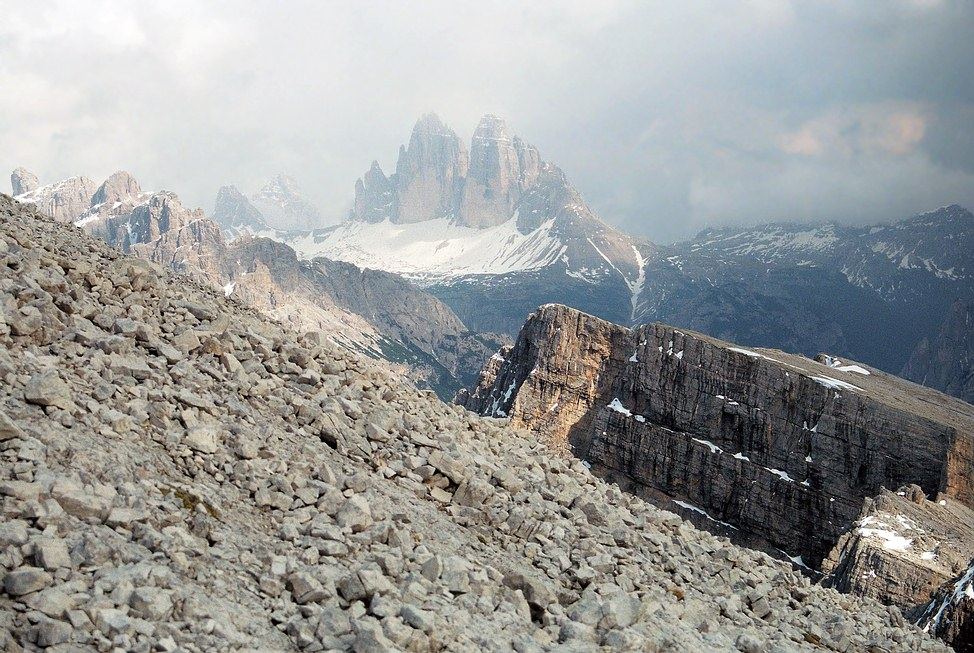 Tre Cime di Lavaredo z Dürrensteinu